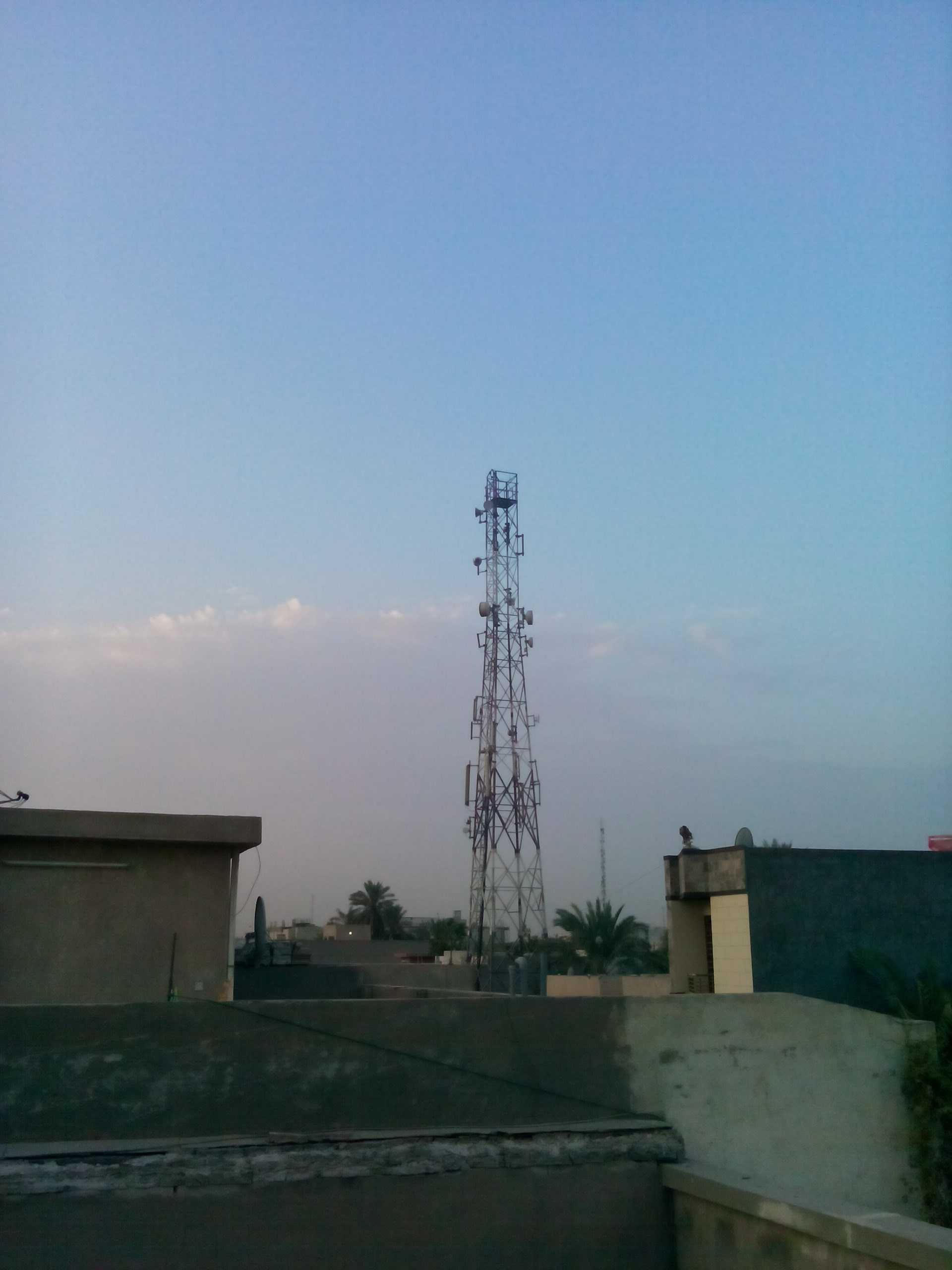 برج شبكة خلوية للهاتف النقال في بغداد